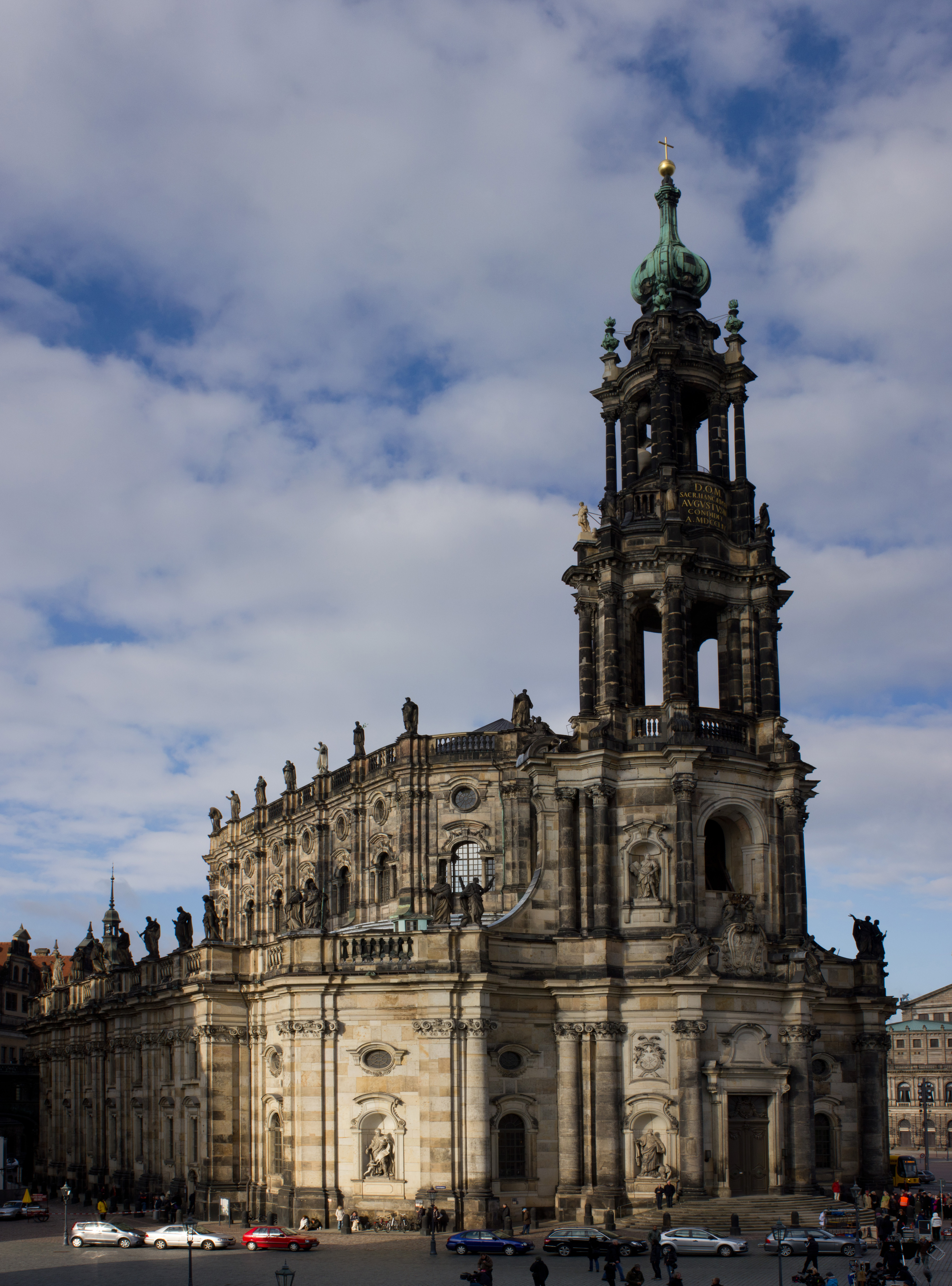 Die Hofkirche in Dresden von der Elbebrücke aus gesehen.